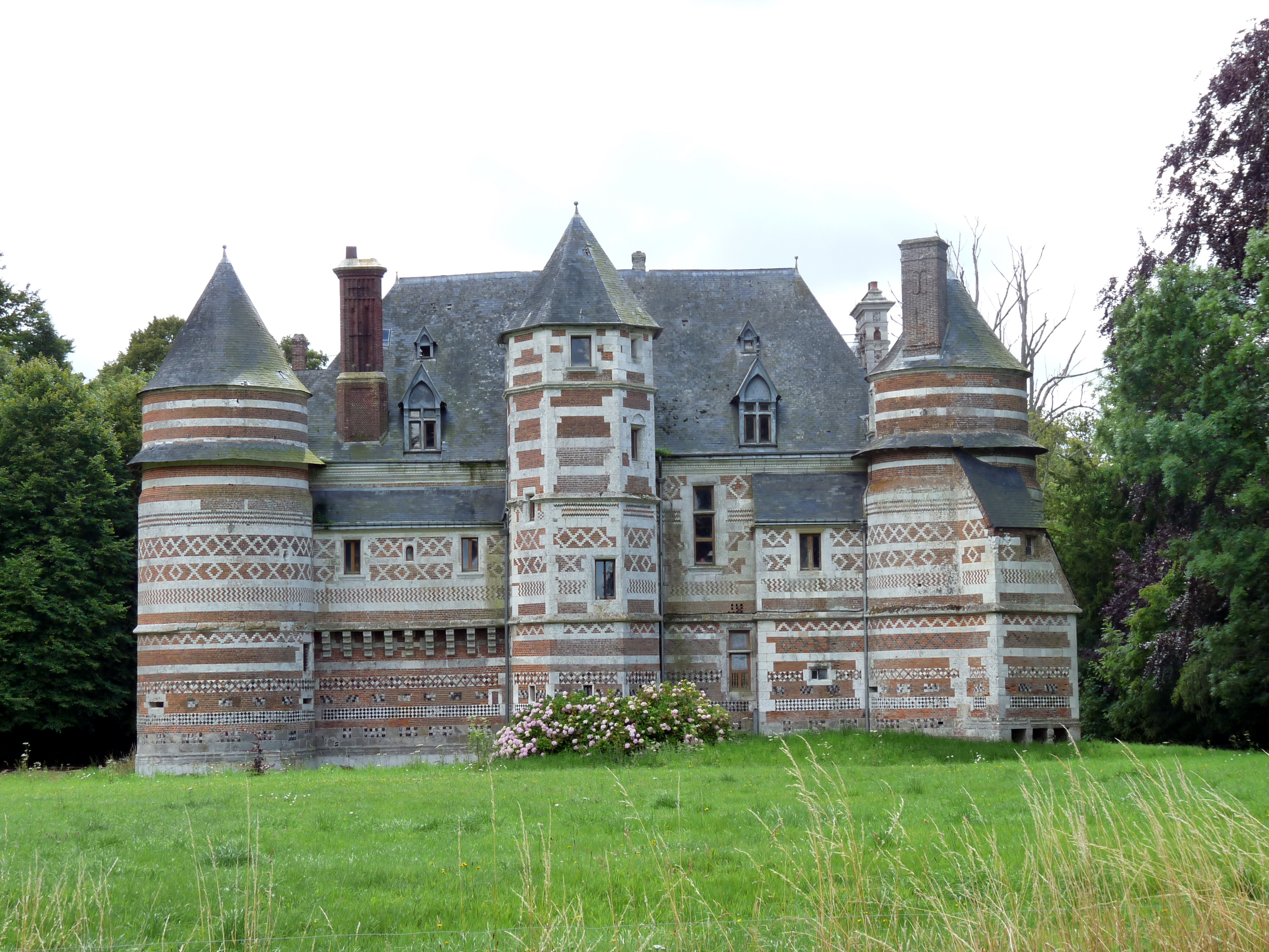 Manoir d'Auffay (InscritInscrit) .